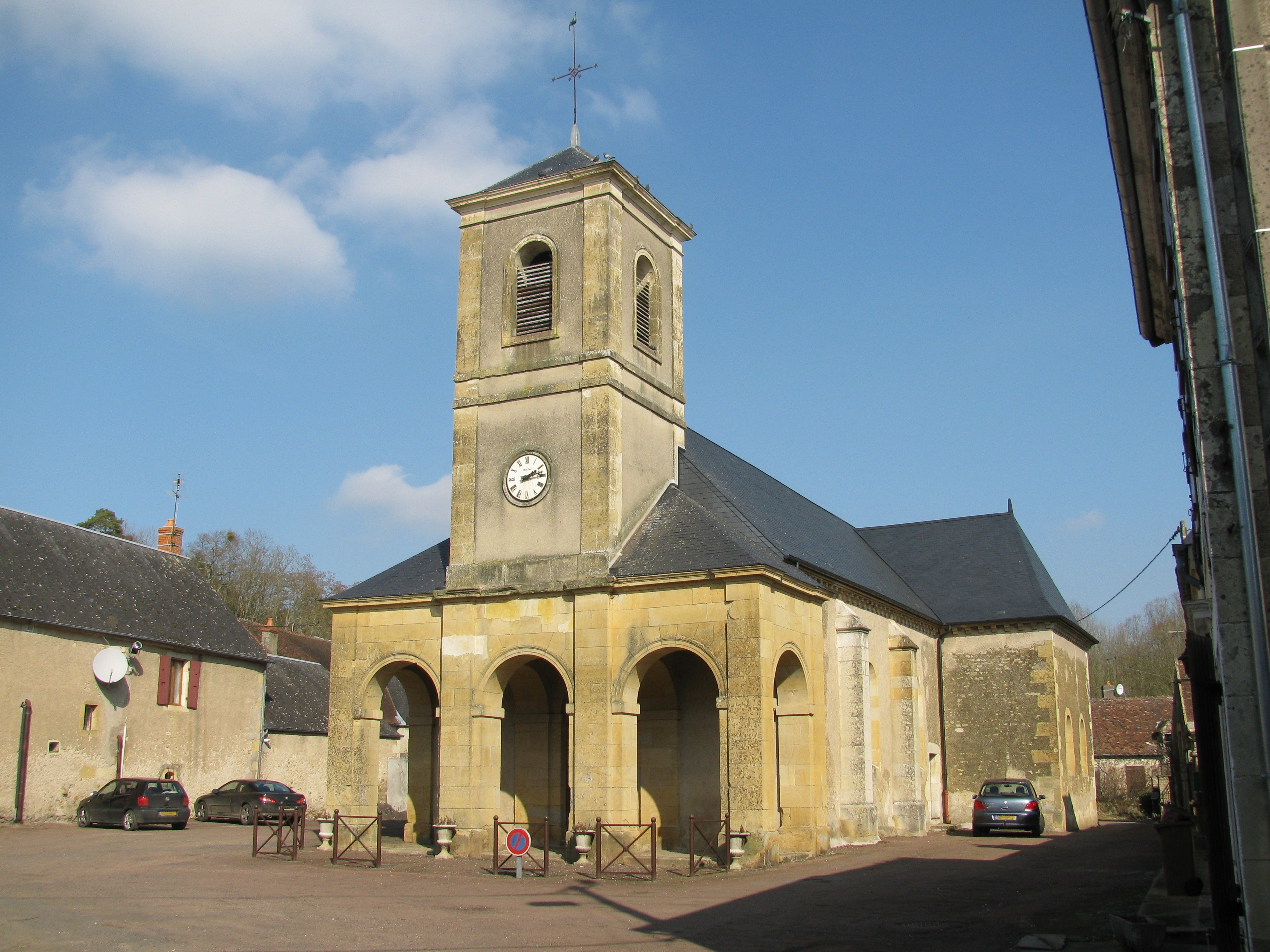 Église de Poiseux, Nièvre, France.